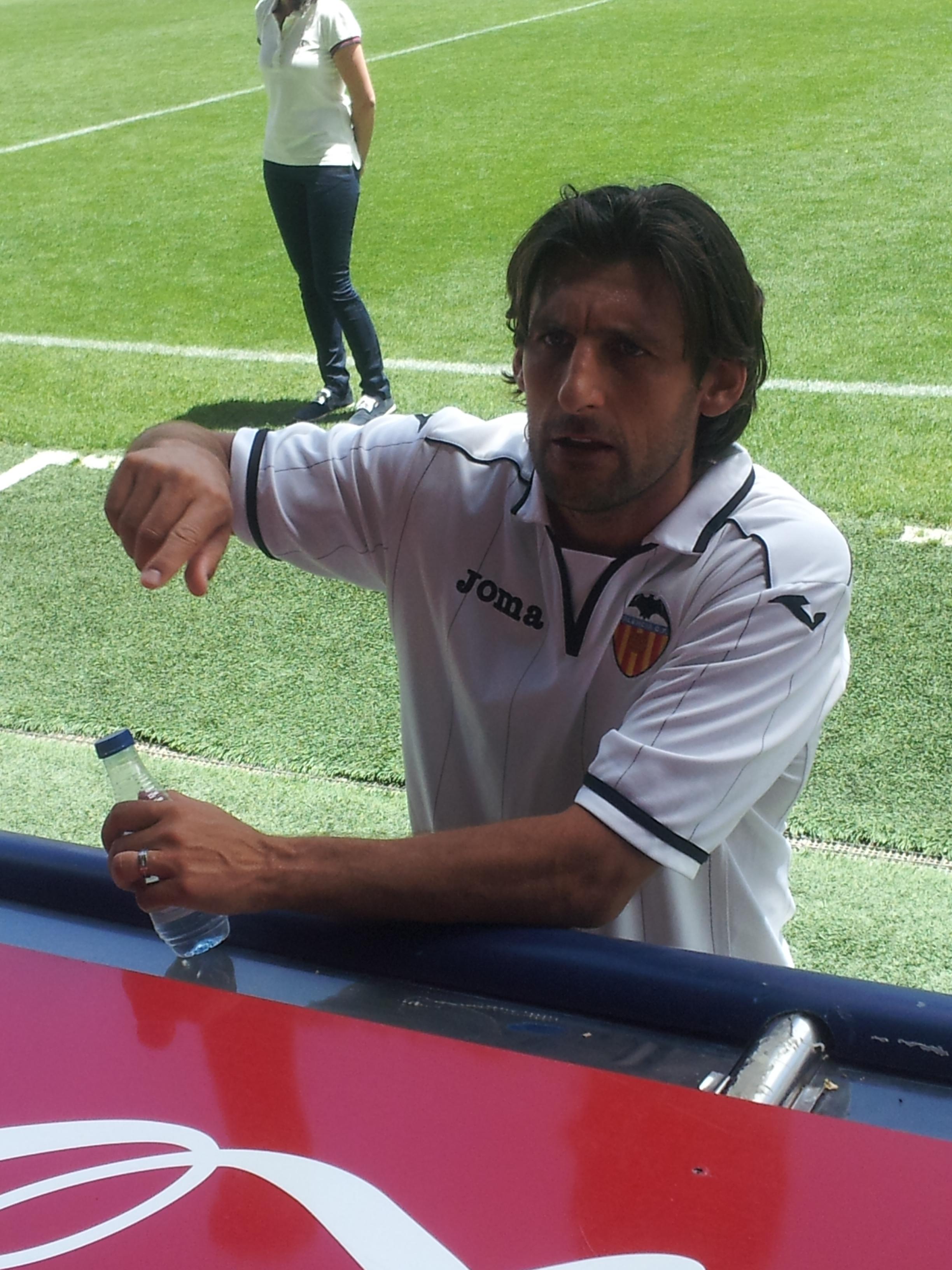 Partit de veterans, juny 2013